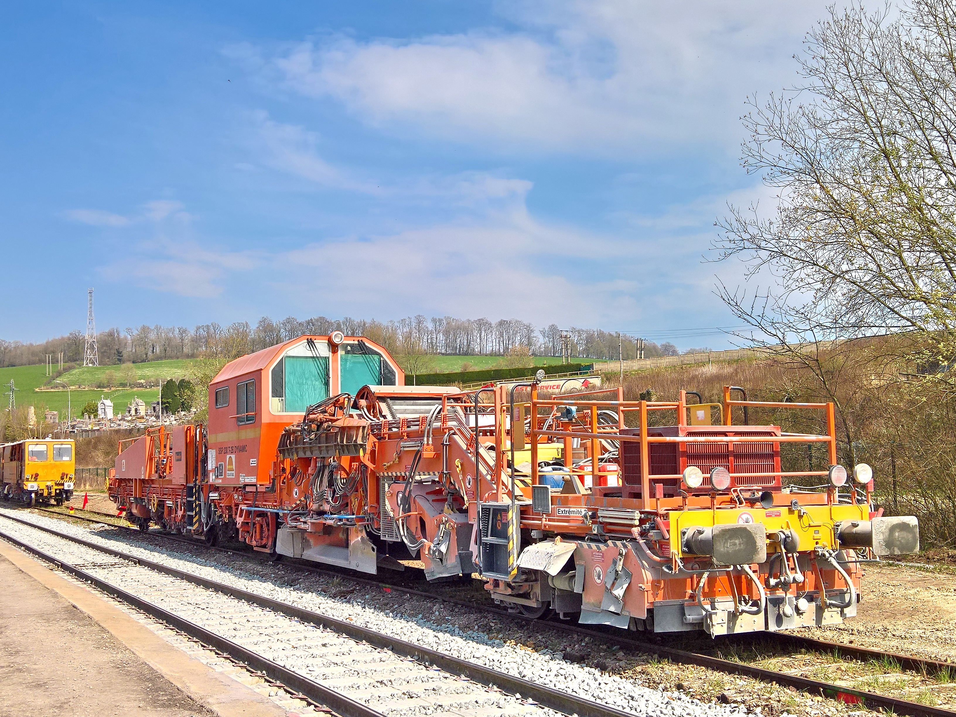 Régaleuse SSP 230 T-2B Dynamic de Colas Rail à Aumale